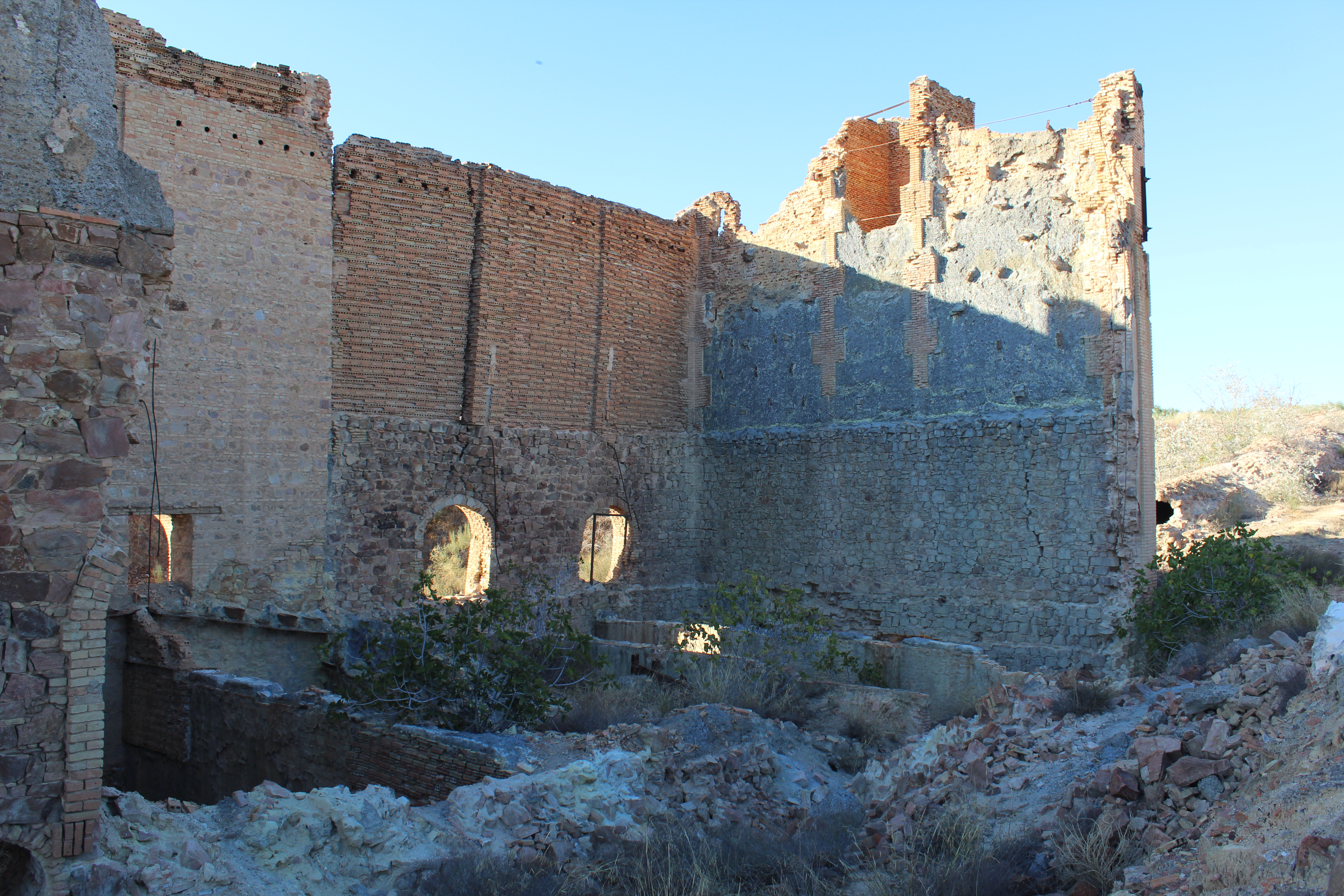 Ruinas de la casa de condensación, donde se pueden observar distintos elementos y técnicas constructivas.